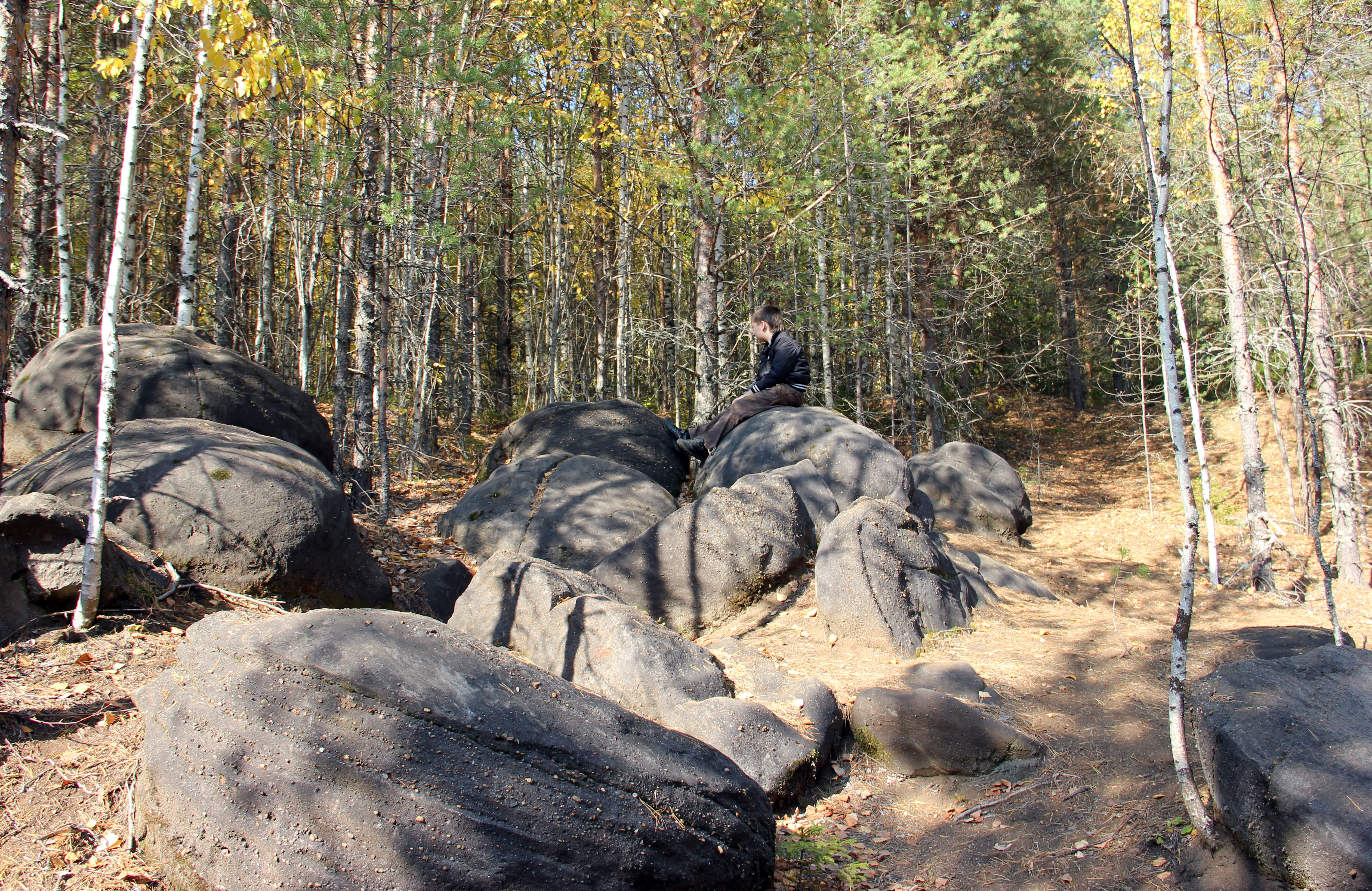 Реликтовые шары, Котельничский район This image is related to the protected area of Russia number 4310100